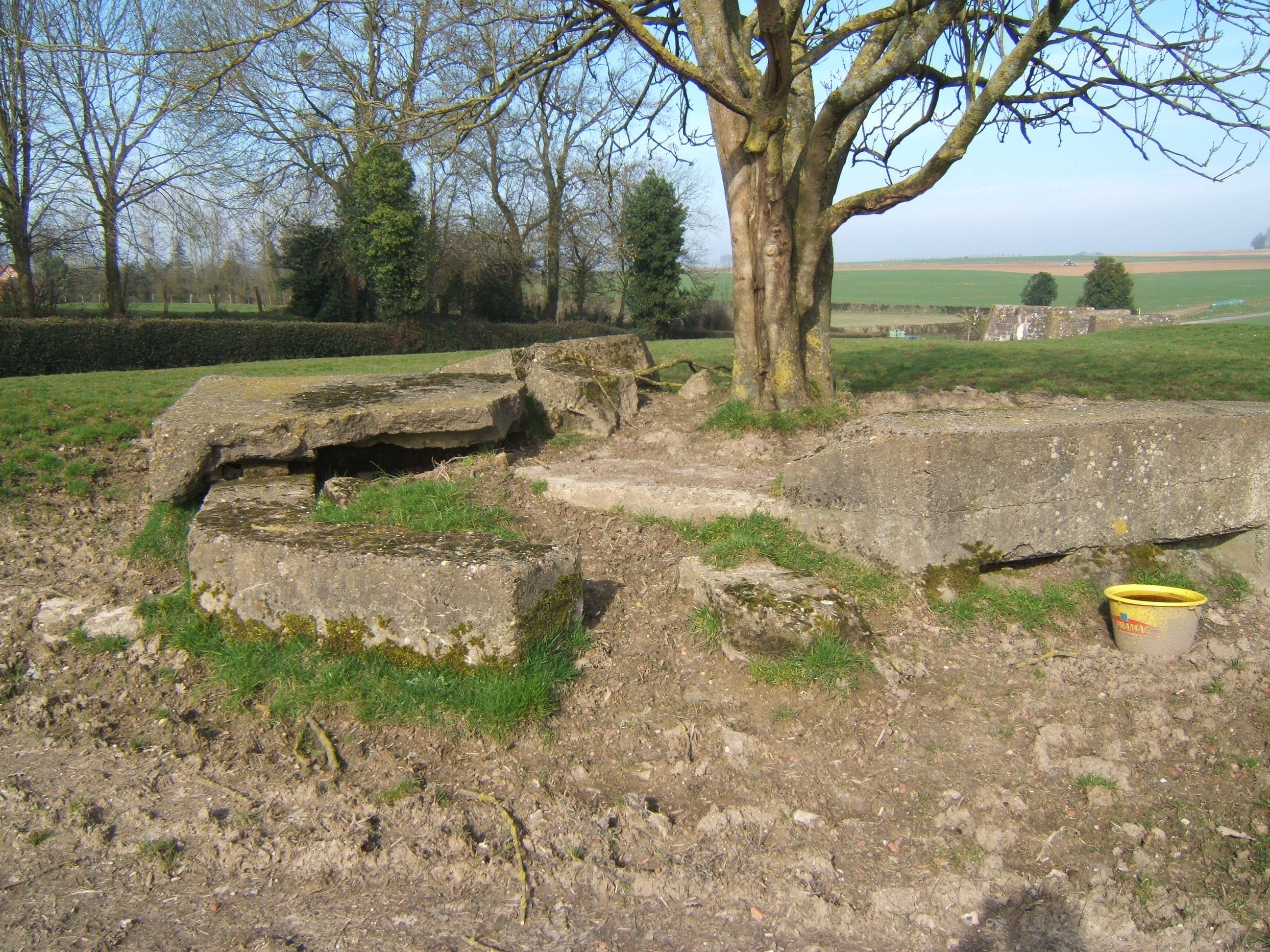 Rampe de lancement V1 à Fresnoy